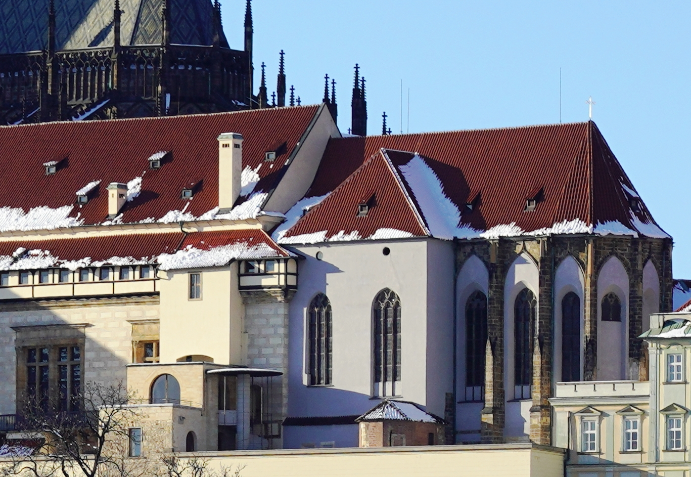 Kostel Všech svatých od Vltavy